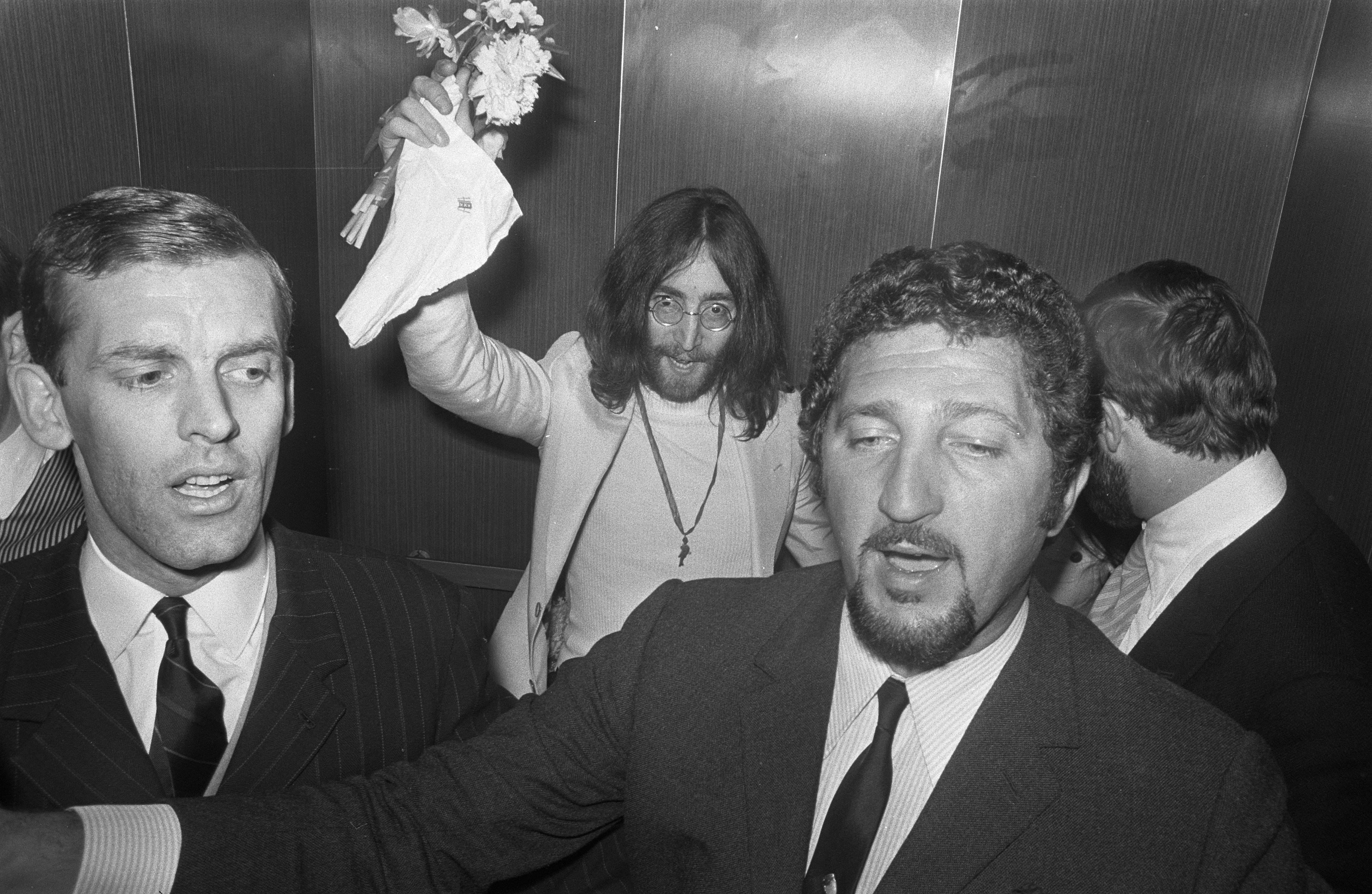 Collectie / Archief : Fotocollectie Anefo Reportage / Serie : [ onbekend ] Beschrijving : John Lennon en Yoko Ono op huwelijksreis in Amsterdam John Lennon bij Hilton Hotel Annotatie : Op de voorgrond acteur Hans Boskamp die namens platenmaatschappij EMI het paar begeleidde Datum : 24 maart 1969 Locatie : Amsterdam, Noord-Holland Trefwoorden : echtparen, hotels, huwelijksreizen, musici, zangers Persoonsnaam : Boskamp, Hans, Lennon, John Fotograaf : Evers, Joost / Anefo Auteursrechthebbende : Nationaal Archief Materiaalsoort : Negatief (zwart/wit) Nummer archiefinventaris : bekijk toegang 2.24.01.05 Bestanddeelnummer : 922-2262